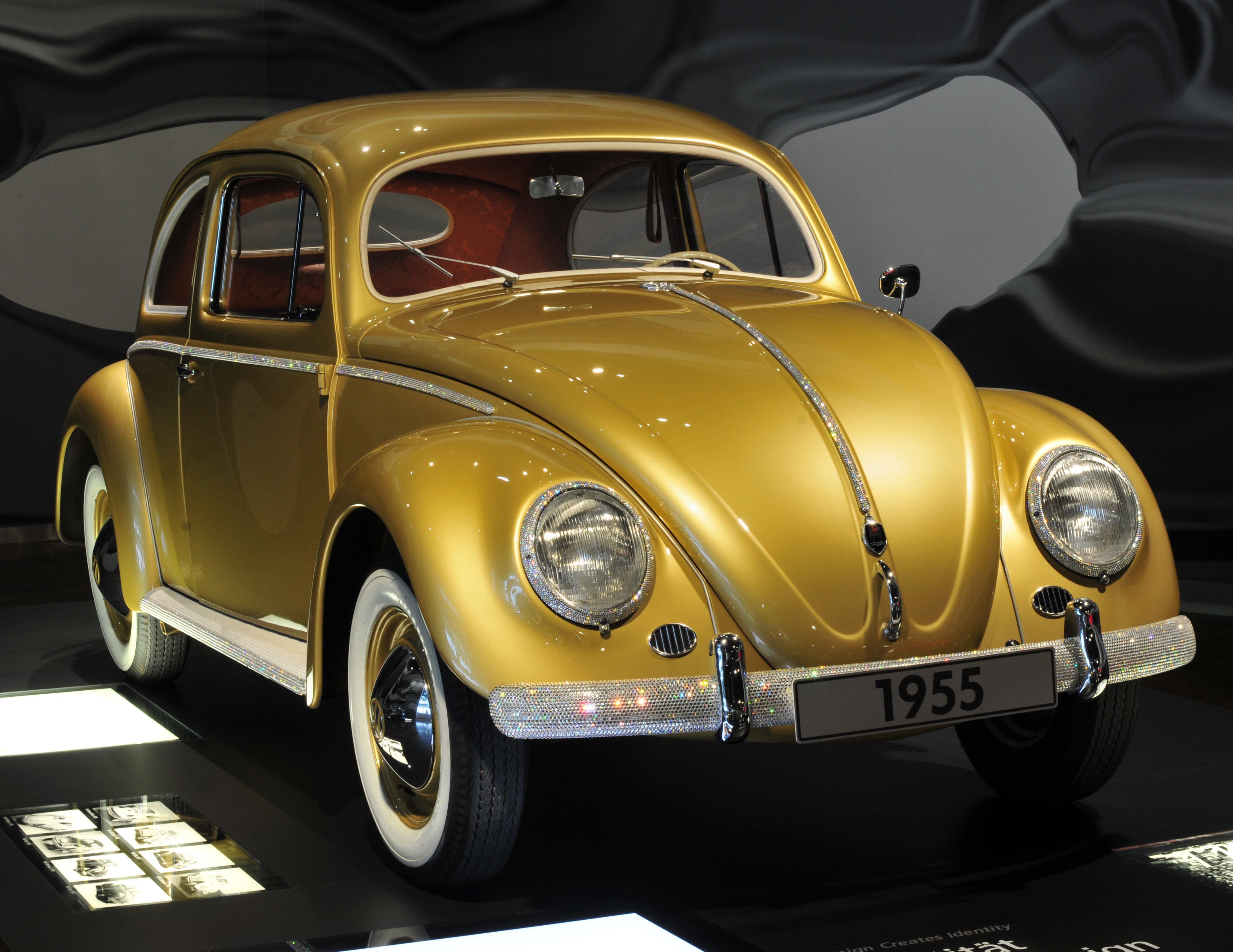 Autostadt Wolfsburg; Auto im Zeithaus